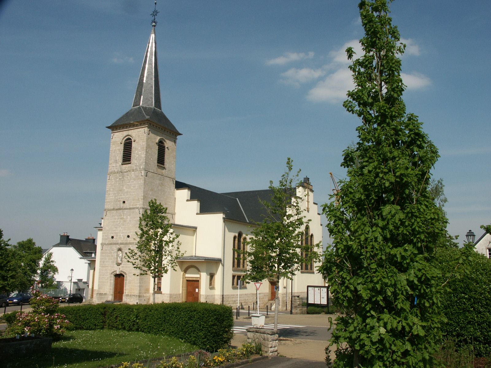 L'église de Kayl (Luxembourg)